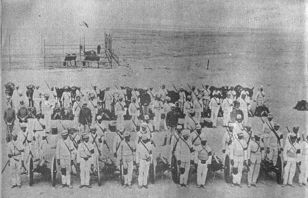 Artillería Nº1 (Antofagasta, 1879)